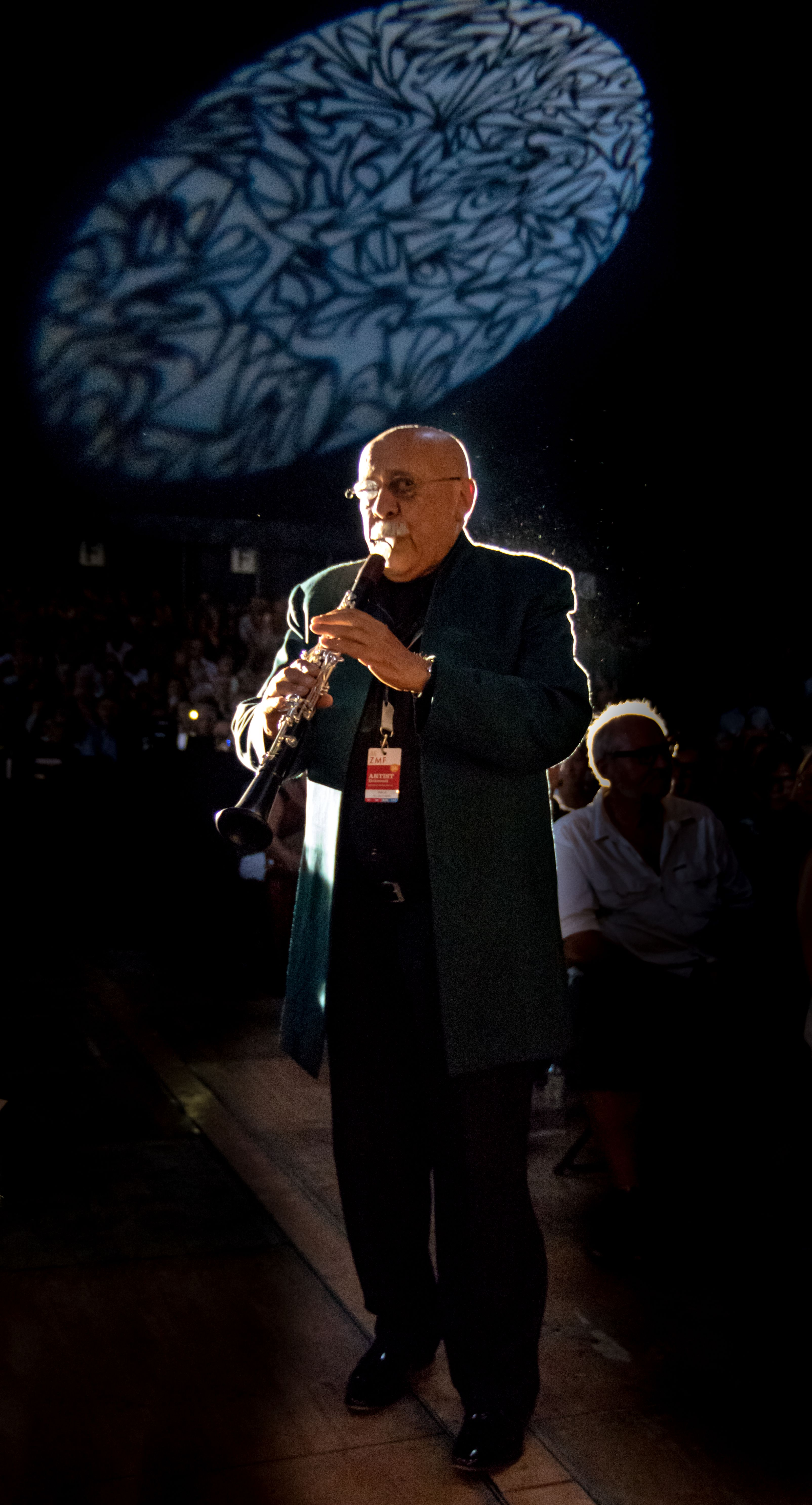 Bilder vom Zelt Musik Festival 2016 in Freiburg im Breisgau Die Gala